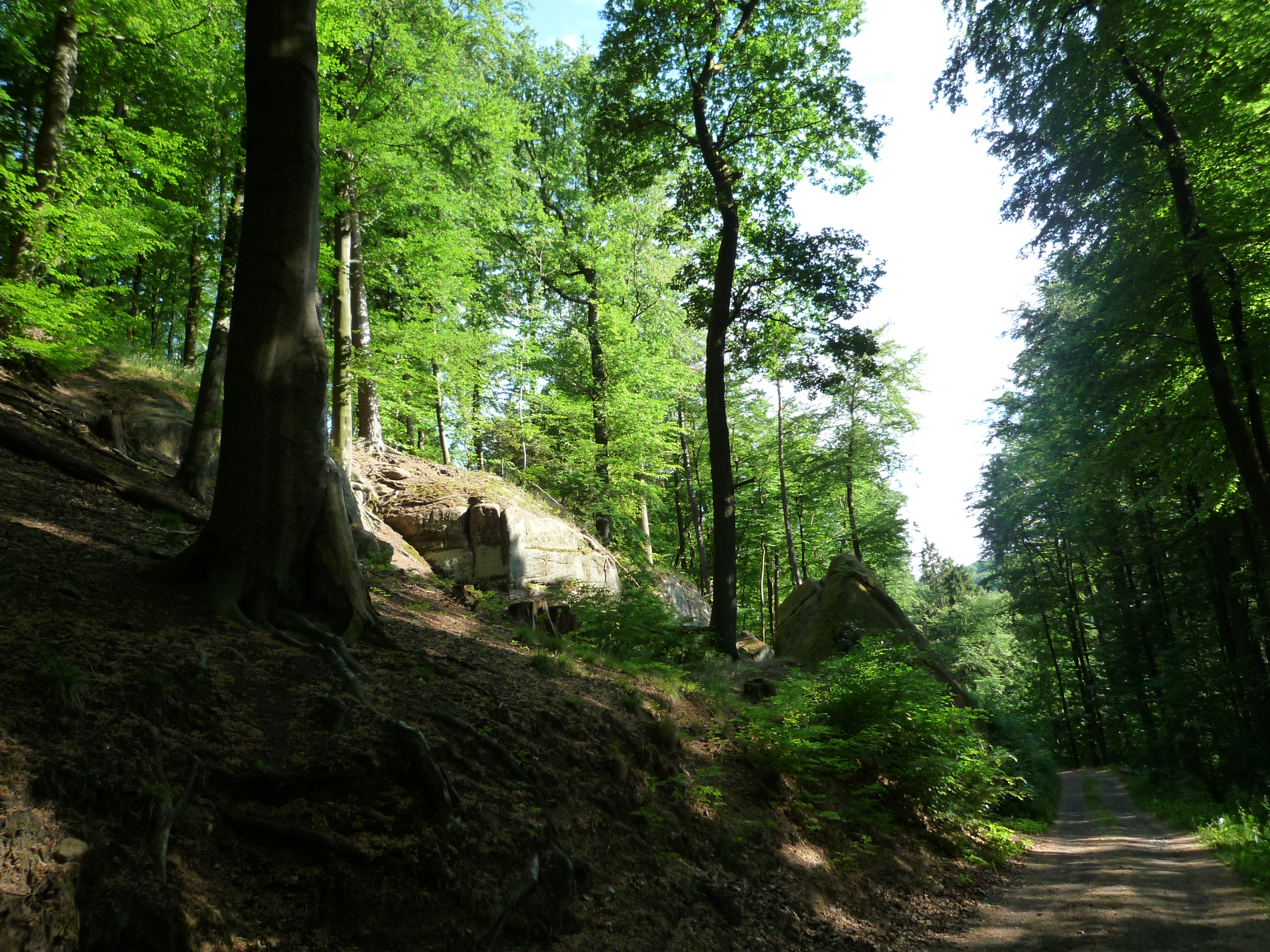 Lichtung mit Fels im St.Ingbert-Kirkeler Waldgebiet